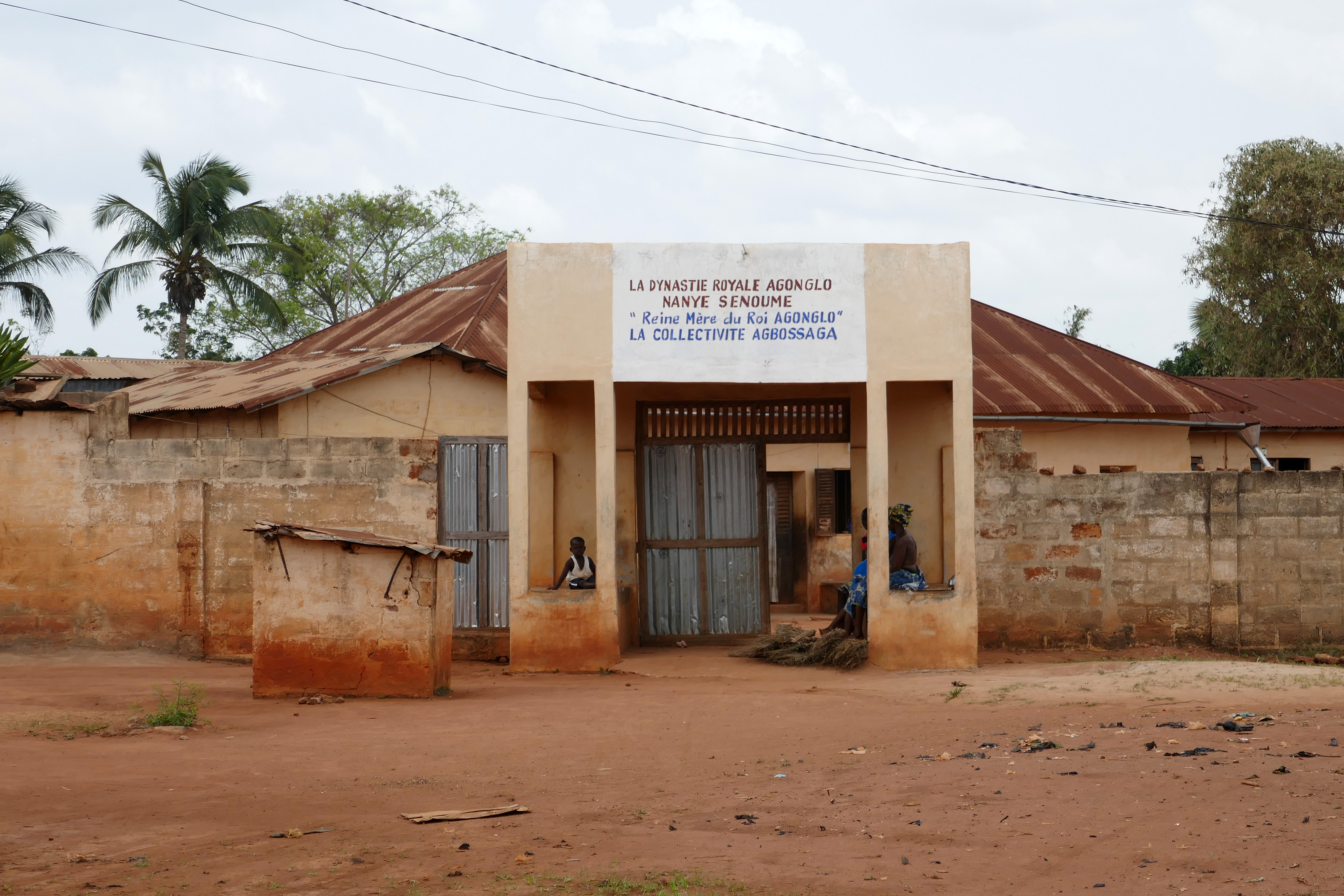 Abomey (Bénin) : Dynastie royale Agonglo Nanye Senoume. "Reine-mère du roi Agonglo". La collectivité Agbossaga.